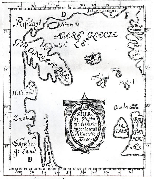 Copia realizada por Thordur Thorlaksson, 1690, de un mapa manuscrito del Atlántico Norte dibujado en 1579 por Sigurd Stéfansson, conservado en la Biblioteca Real de Copenague. Groenlandia y el "promontorio de winlandia" aparecen como penínsulas de un continente que se prolonga desde Escandinavia. Las nociones geográficas de este mapa son un argumento más a favor de quienes defienden la falsedad del llamado Mapa de Vinlandia.